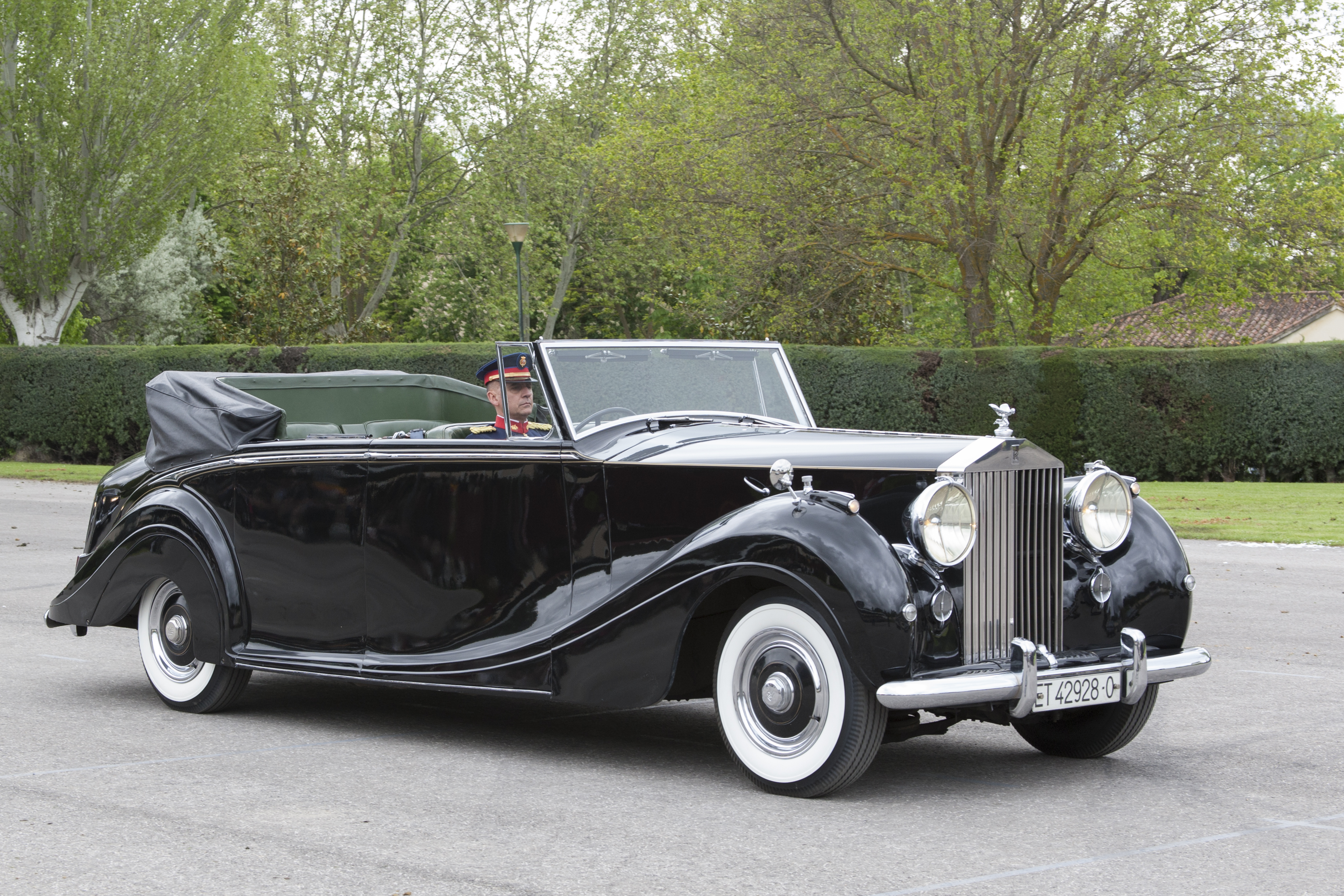 Rolls-Royce Phantom IV del Ejército de Tierra de España, número de chasis 4AF18.